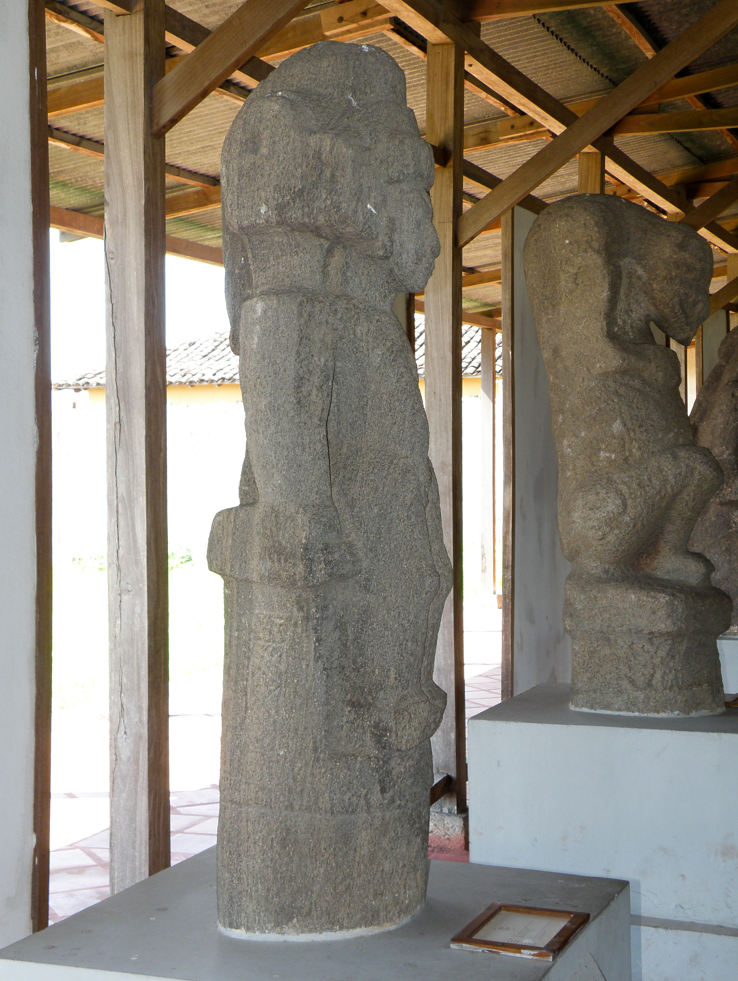 Statue zoomorphe